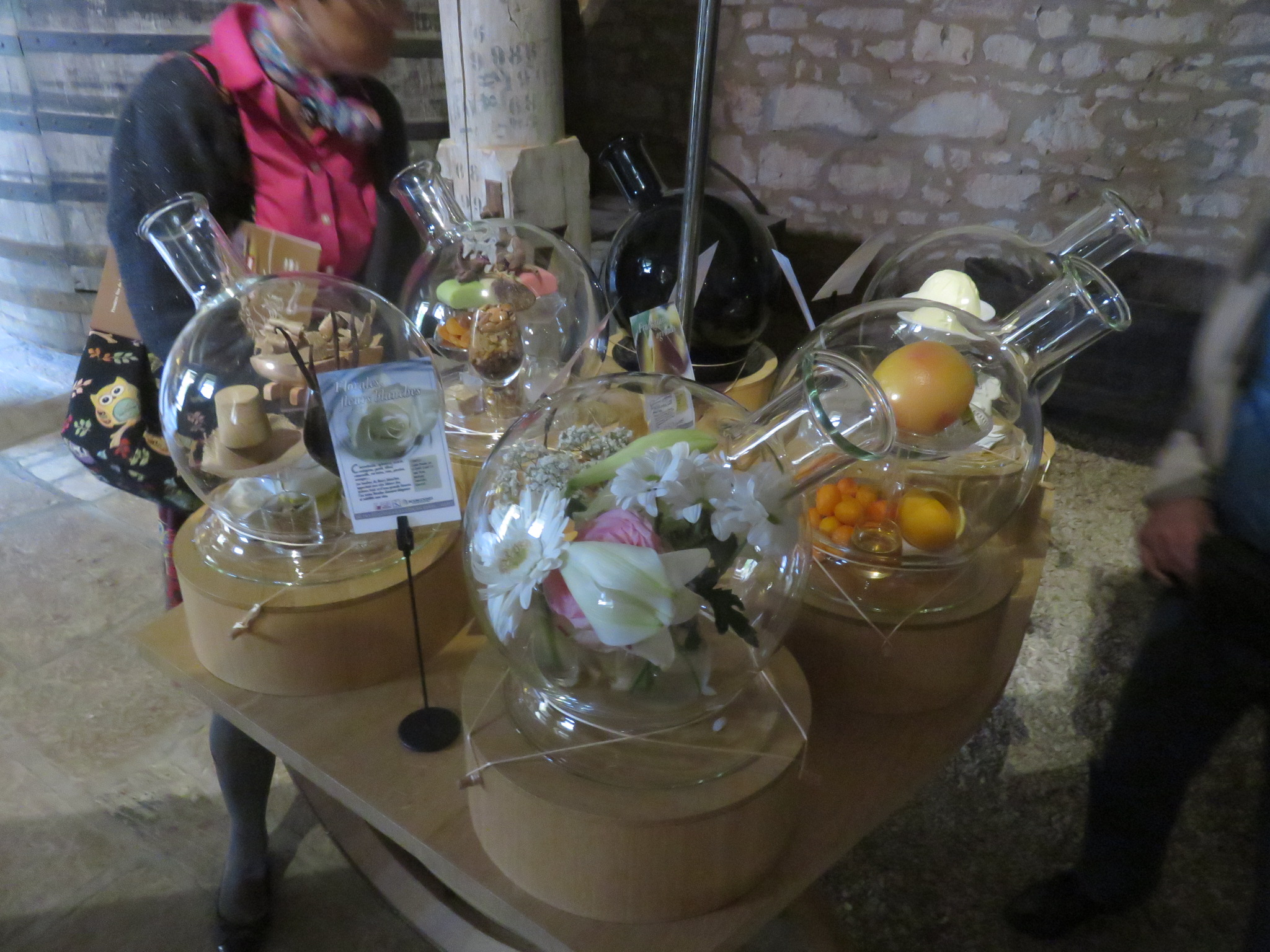 Château du Clos de Vougeot, salon Livres en Vignes 2015, stand oenophilie